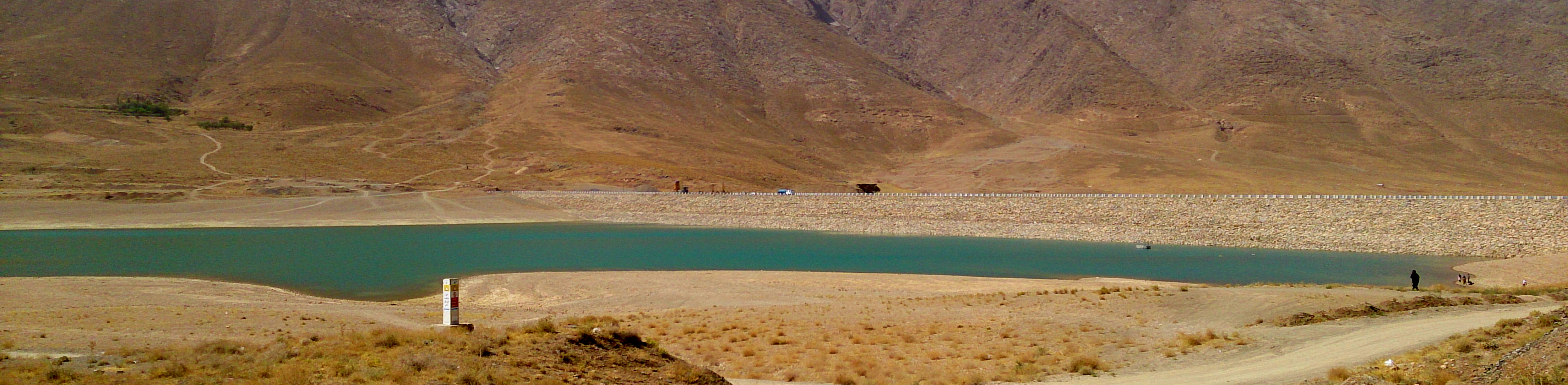 سد باغکل شهر خوانسار